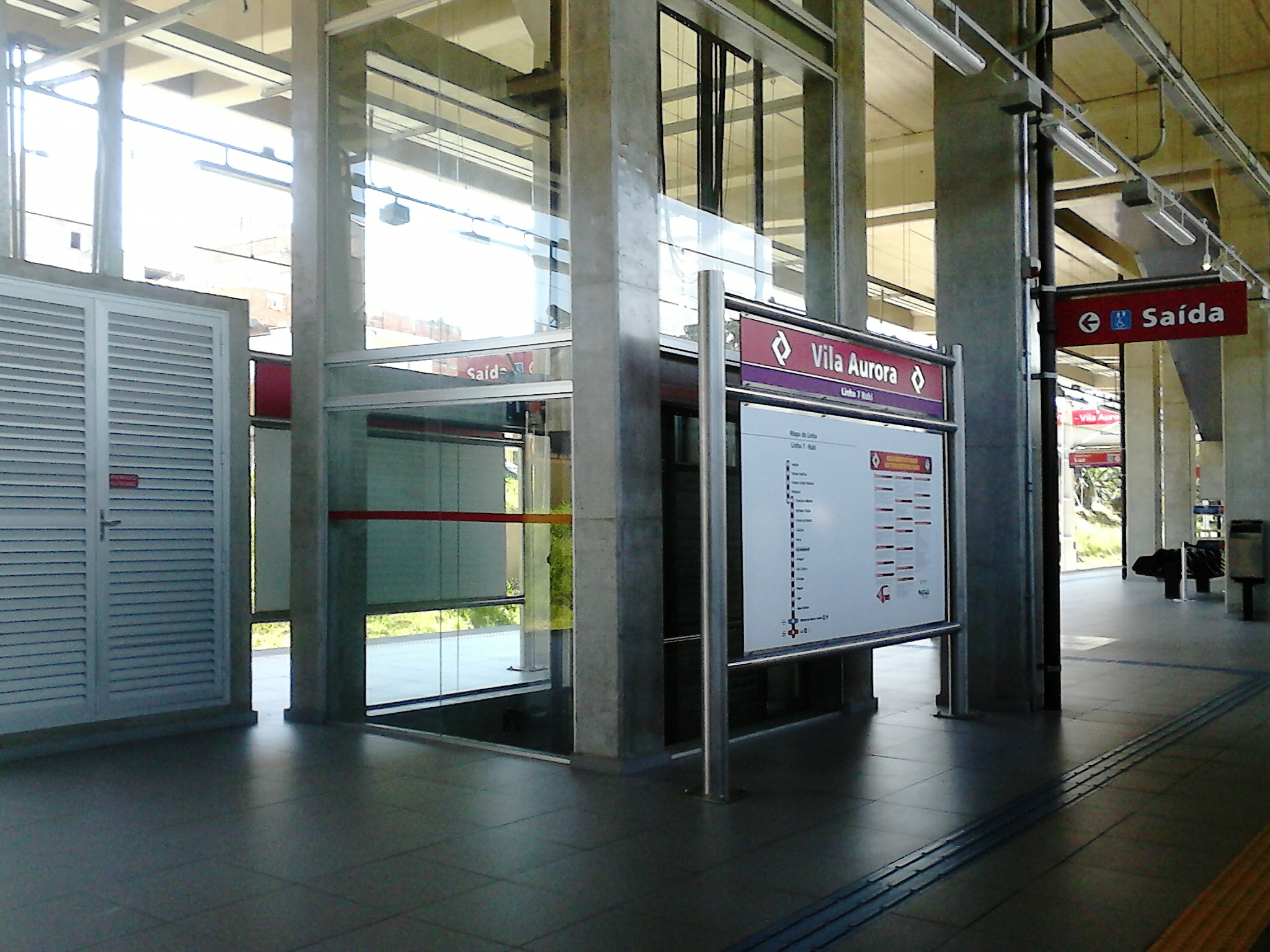 Interior da Estação Vila Aurora da Linha 7 - Rubi